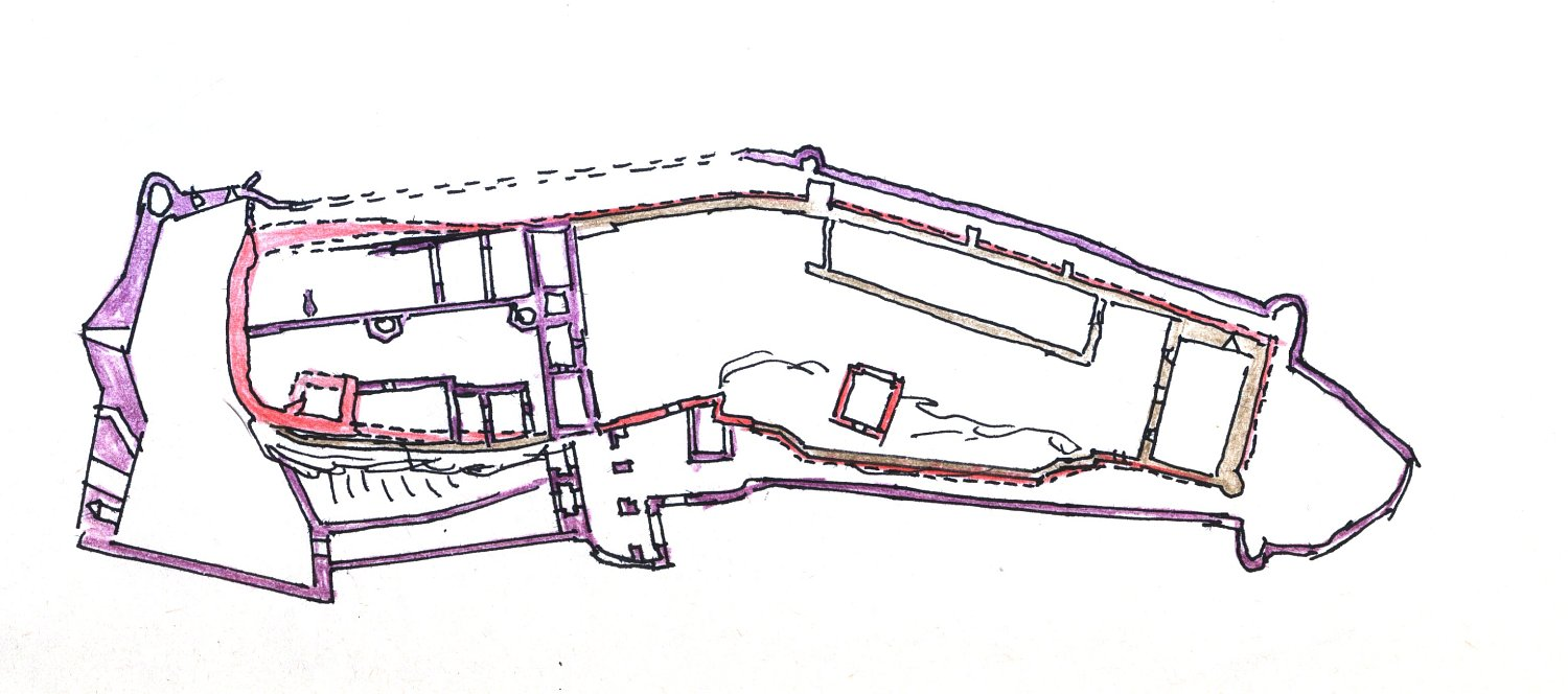 Grundriss der Madenburg rot = romanischer Kernbau braun = gotische Erweiterungen (14.Jh.) violett = Erweiterungen des 15. und 16. Jh.